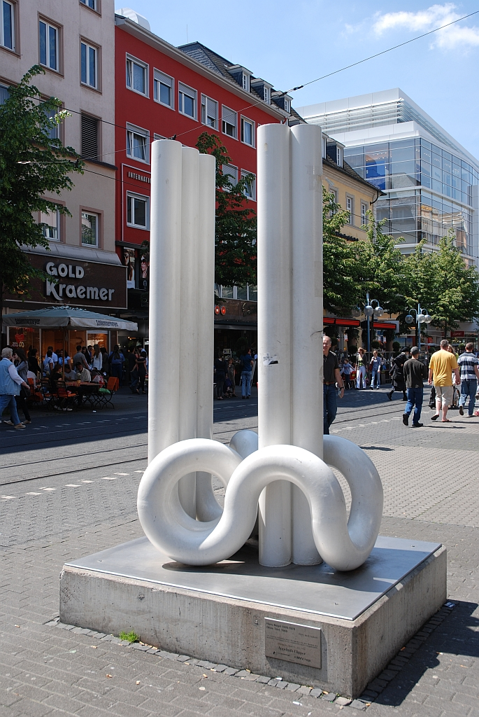 Hans Nagel: Ohne Titel (1969). Stahl, Standort: Planken, zwischen P4 und P5, Mannheim